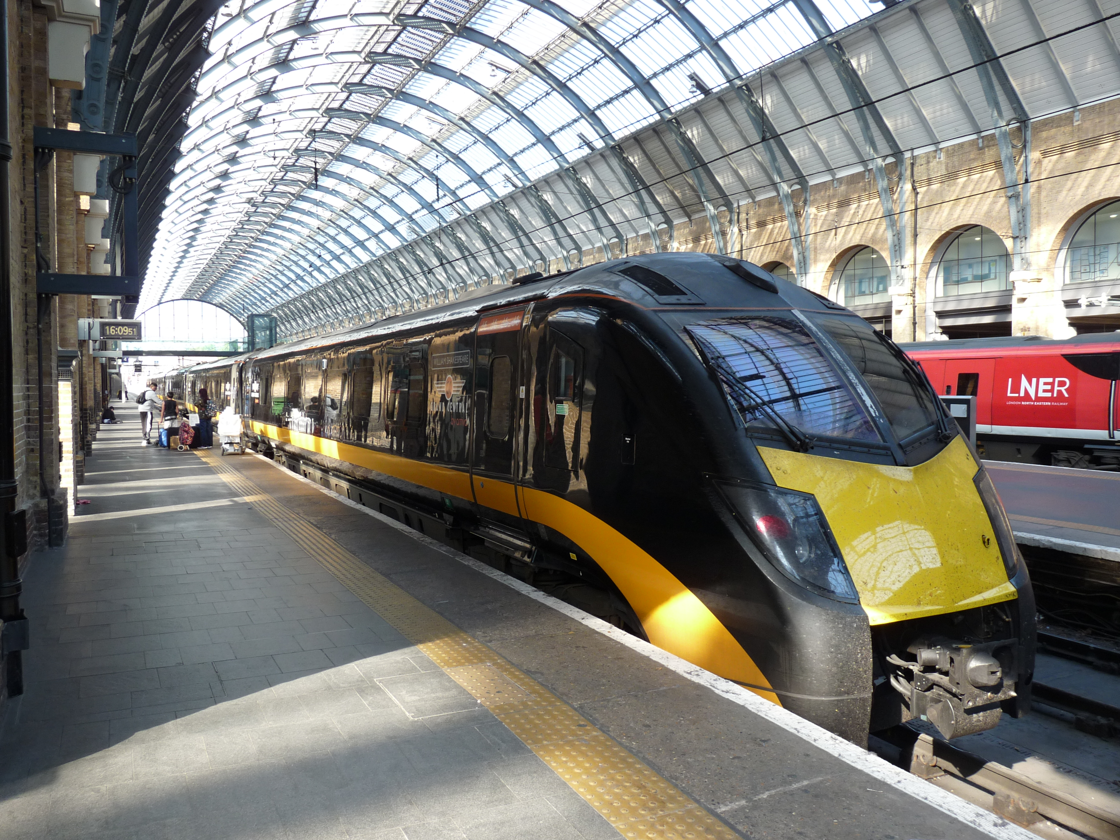 Treinen in het station van Kings Cross